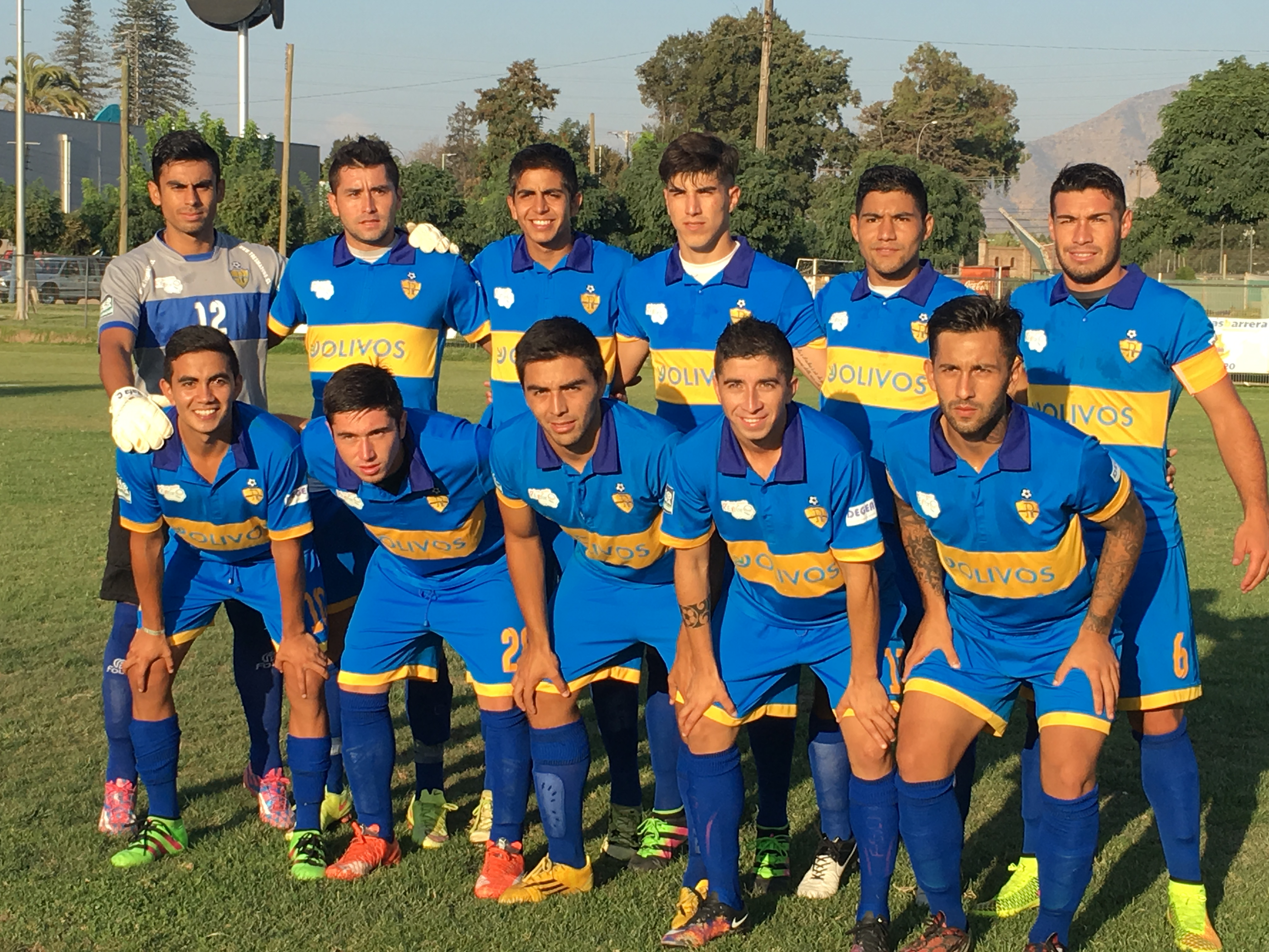 Equipo Titular Deportes Rengo frente a Lautaro de Buin